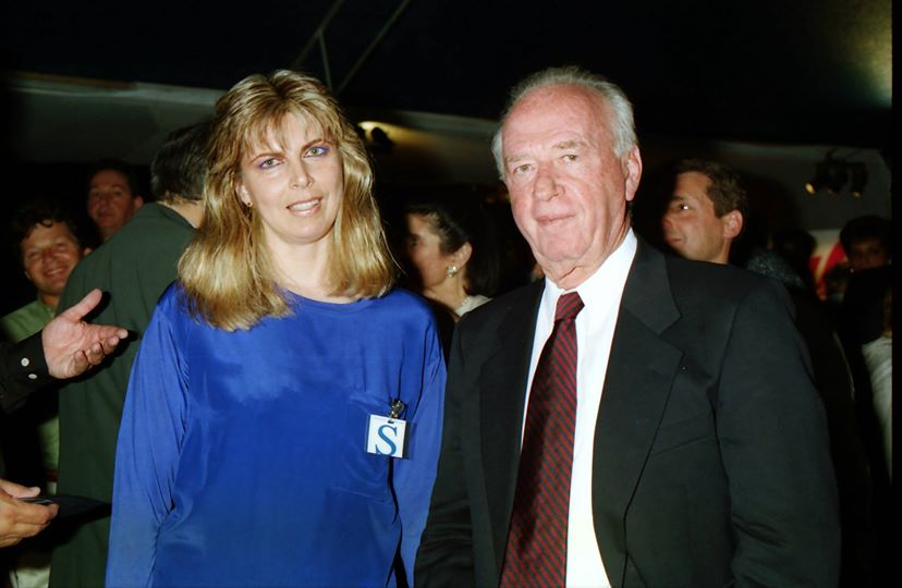 יצחק רבין ומירי שילון בקוקטייל שערכה לכבוד השתתפותו בתכנית מיוחדת ליום העצמאות